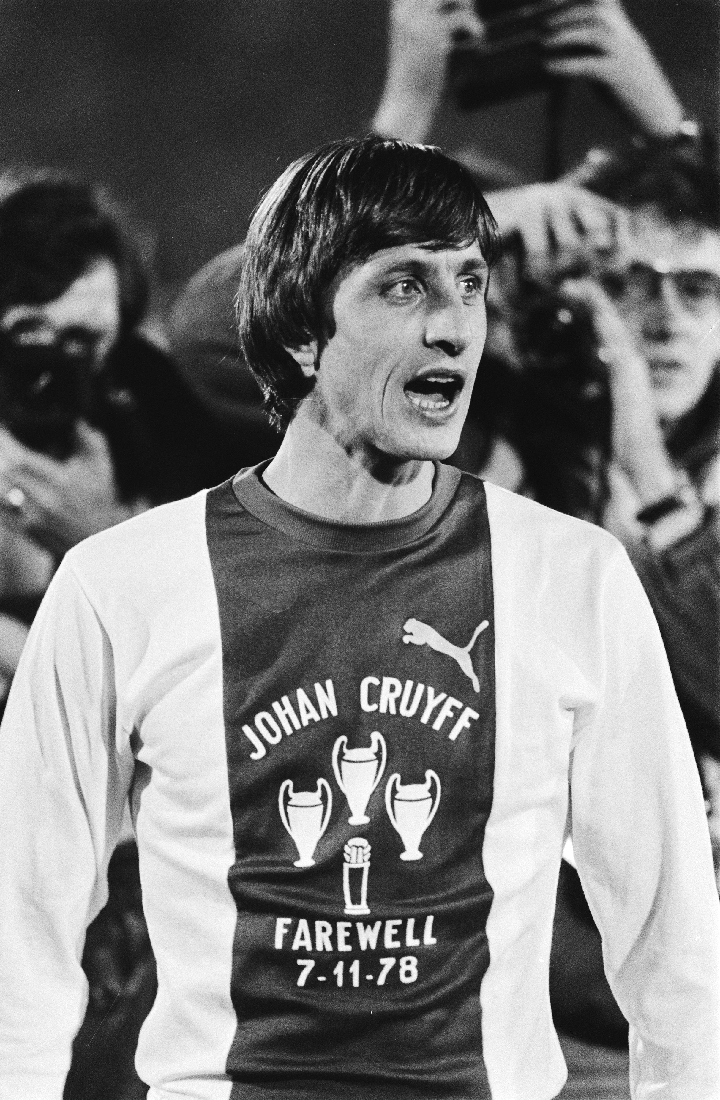 Afscheidswedstrijd Johan Cruyff , Ajax tegen Bayern Munchen 0-8; Johan Cruyff in afscheidsshirt